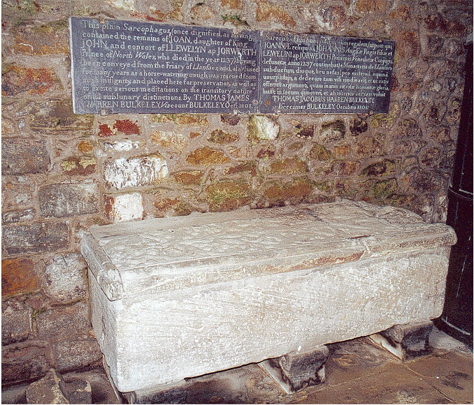 Siwan. Tywysoges. Gwraig Llywelyn Fawr.